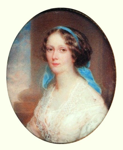 Баронесса Мария Петровна Будберг, ур. Убри (1819 – 22.12.1913)